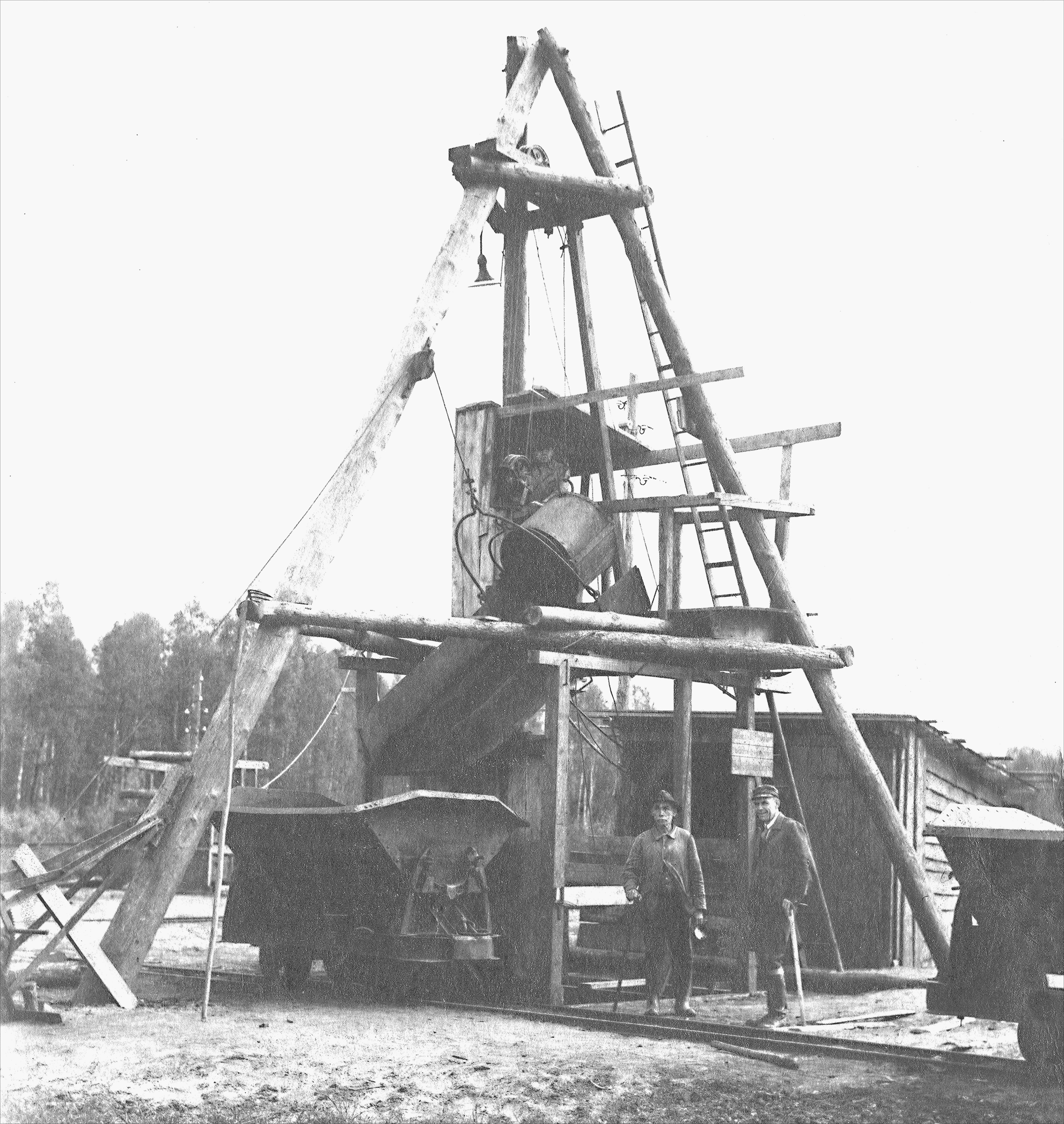 Dreibock-Schachtgerüst im Grubenfeld Gülitz. Hier wurde mittels Kübel und Haspelförderung die Braunkohle nach Übertage gefördert und in Feldbahnloren gestürzt. Im Vordergrund links, mit Karbidlampe und Fahrstock: Obersteiger Johannes Porwik (* 12.07.1884; † 17.12.1950), der Großvater von Eckart Starke.Im Vordergrund rechts, Dipl. Berging. Wilhelm Reichardt ( * 27.09.1901 + 03.06.1976)